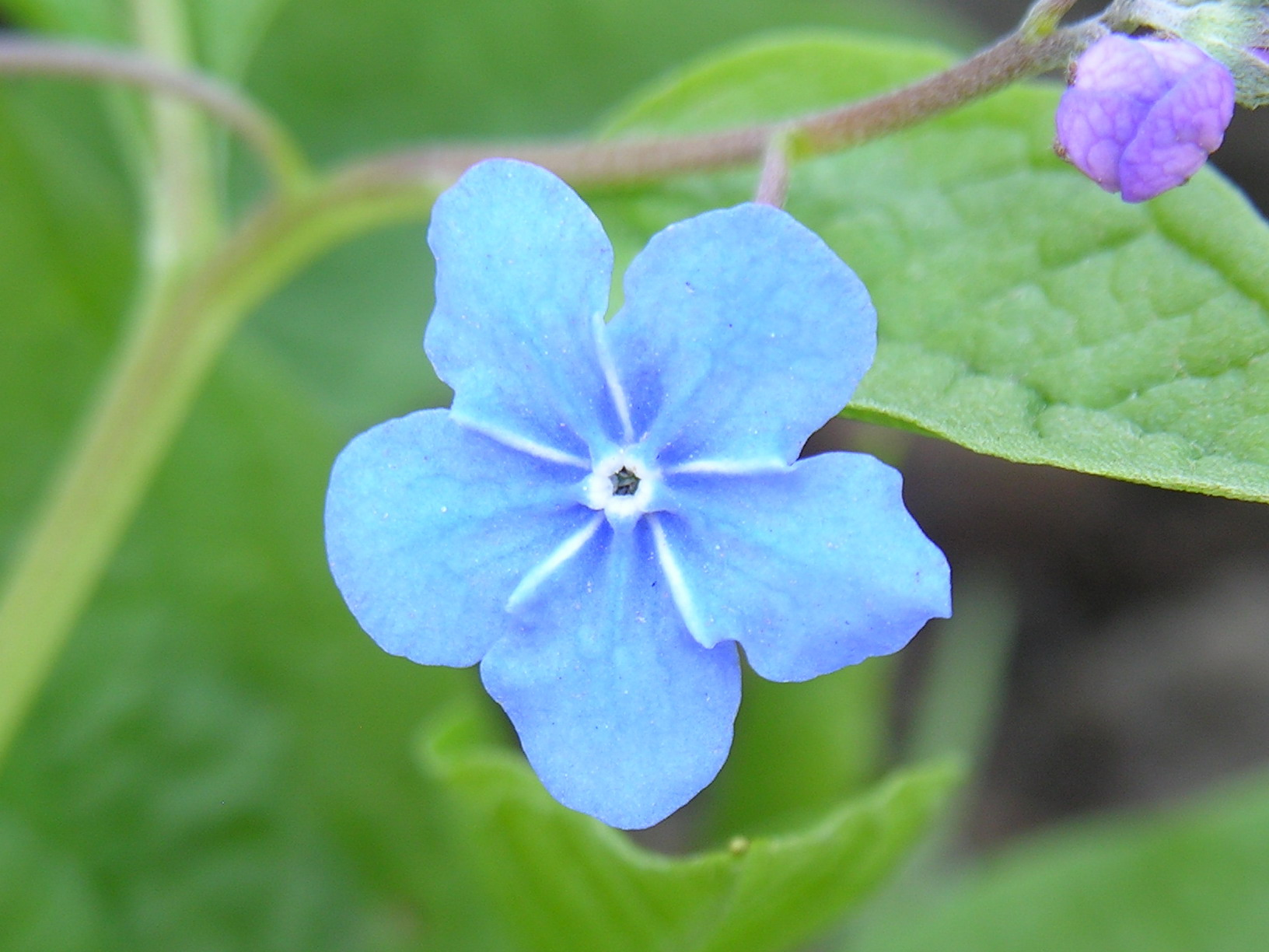 Pavasarinis poraitis (Omphalodes verna) Šeima. Agurkliniai (Boraginaceae) Fotografavo: Algirdas, 2006 m. gegužės 3 d.